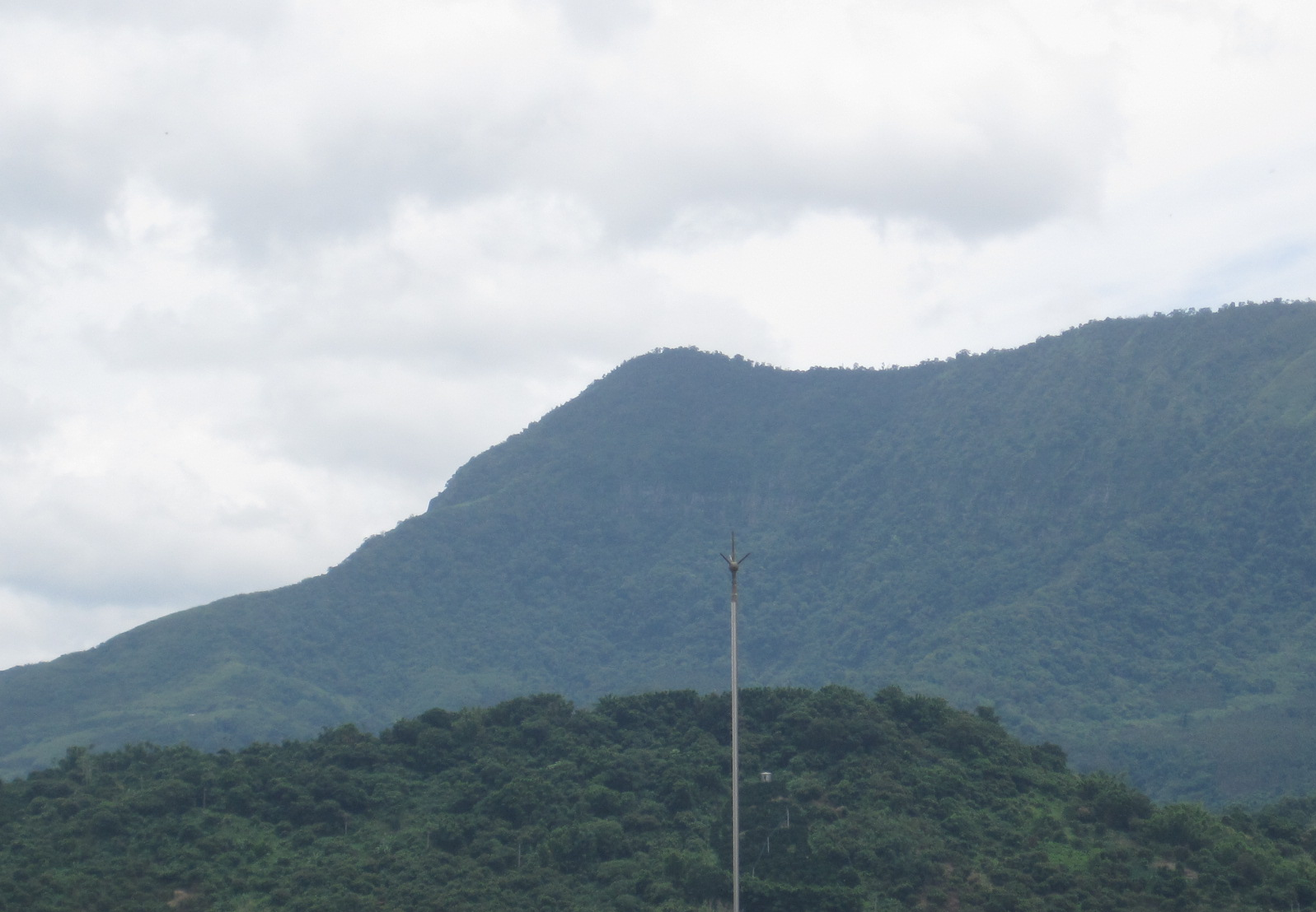 從臺南市東山區的仙湖農場拍攝的大凍山。